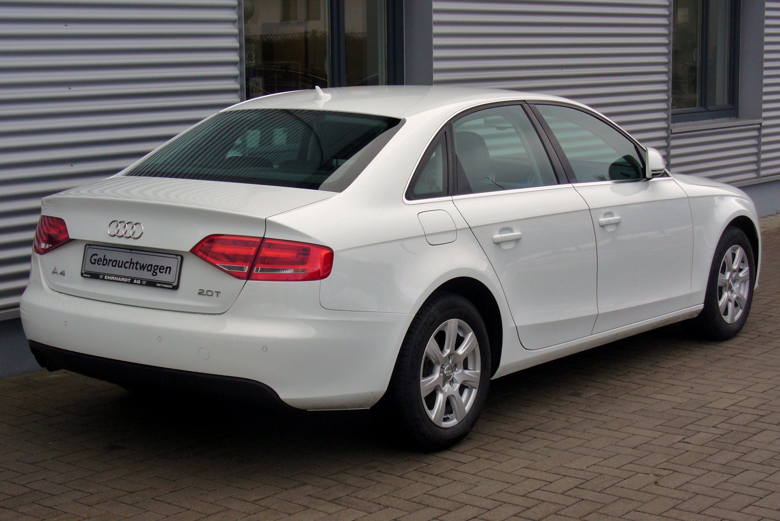 Audi A4 Limousine